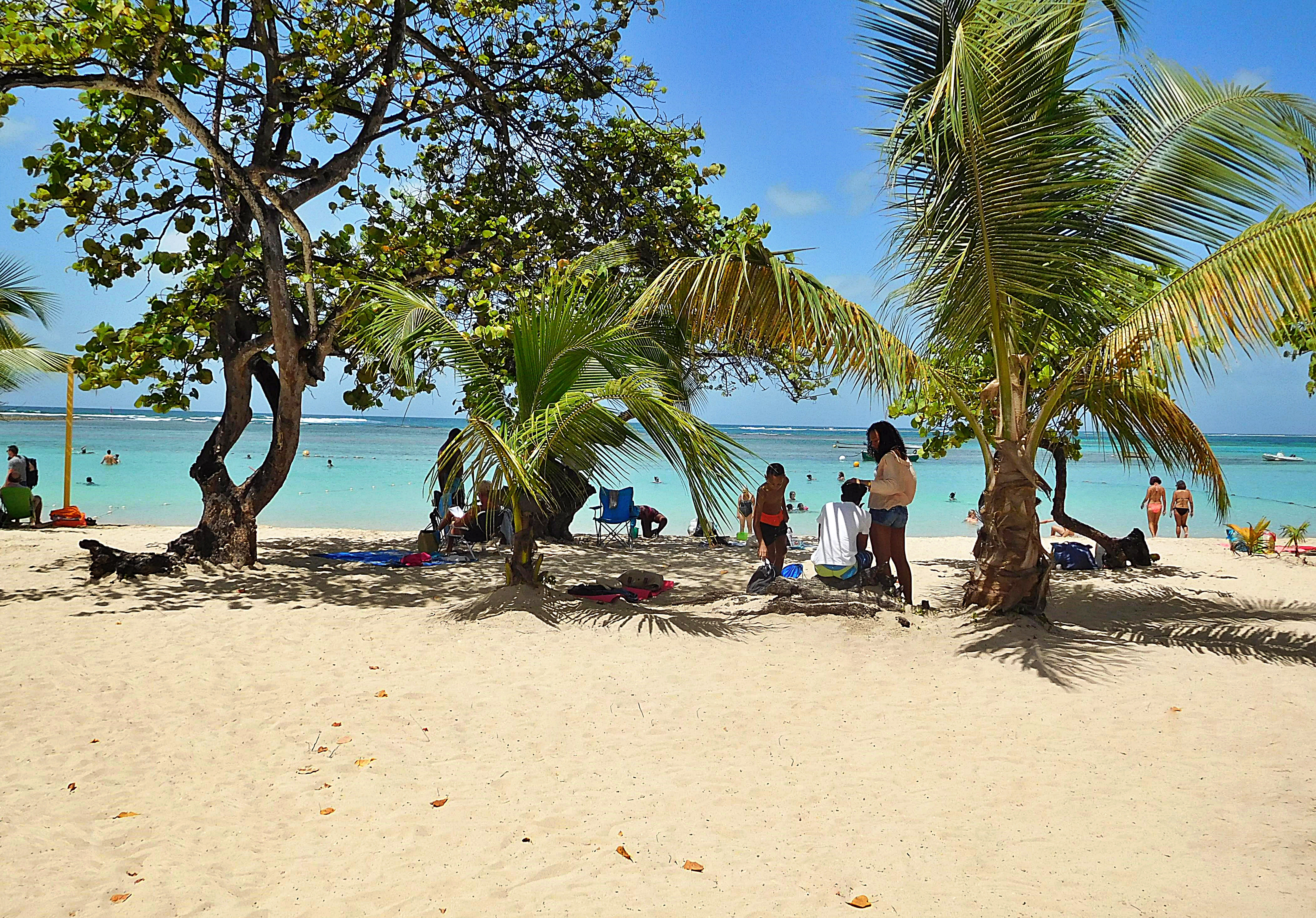 Plage municipale de Saint anne en Guadeloupe.